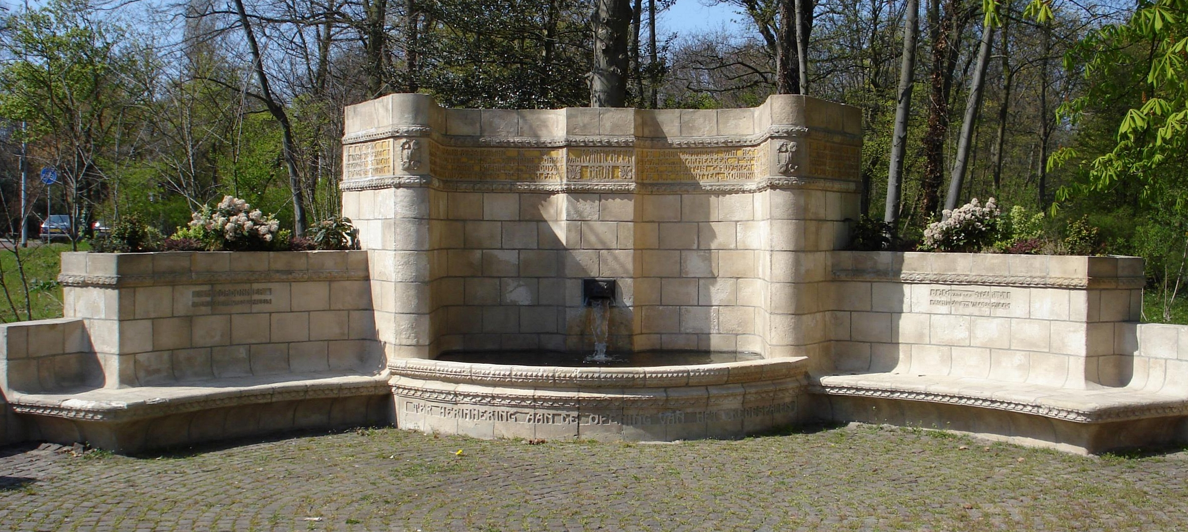 Den Haag, Carnegielaan. Monument "Van Karnebeekbron" van Willem Brouwer. Den Haag/The Netherlands.